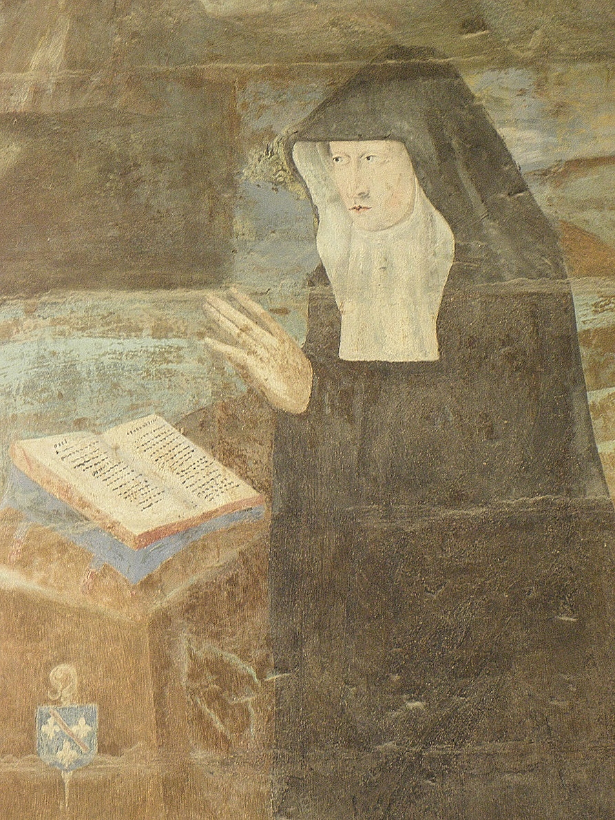 Isabeau de Bourbon (1475-1531), abbesse de la Trinité de Caen de 1505 à 1531.